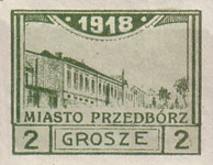 1918 rok